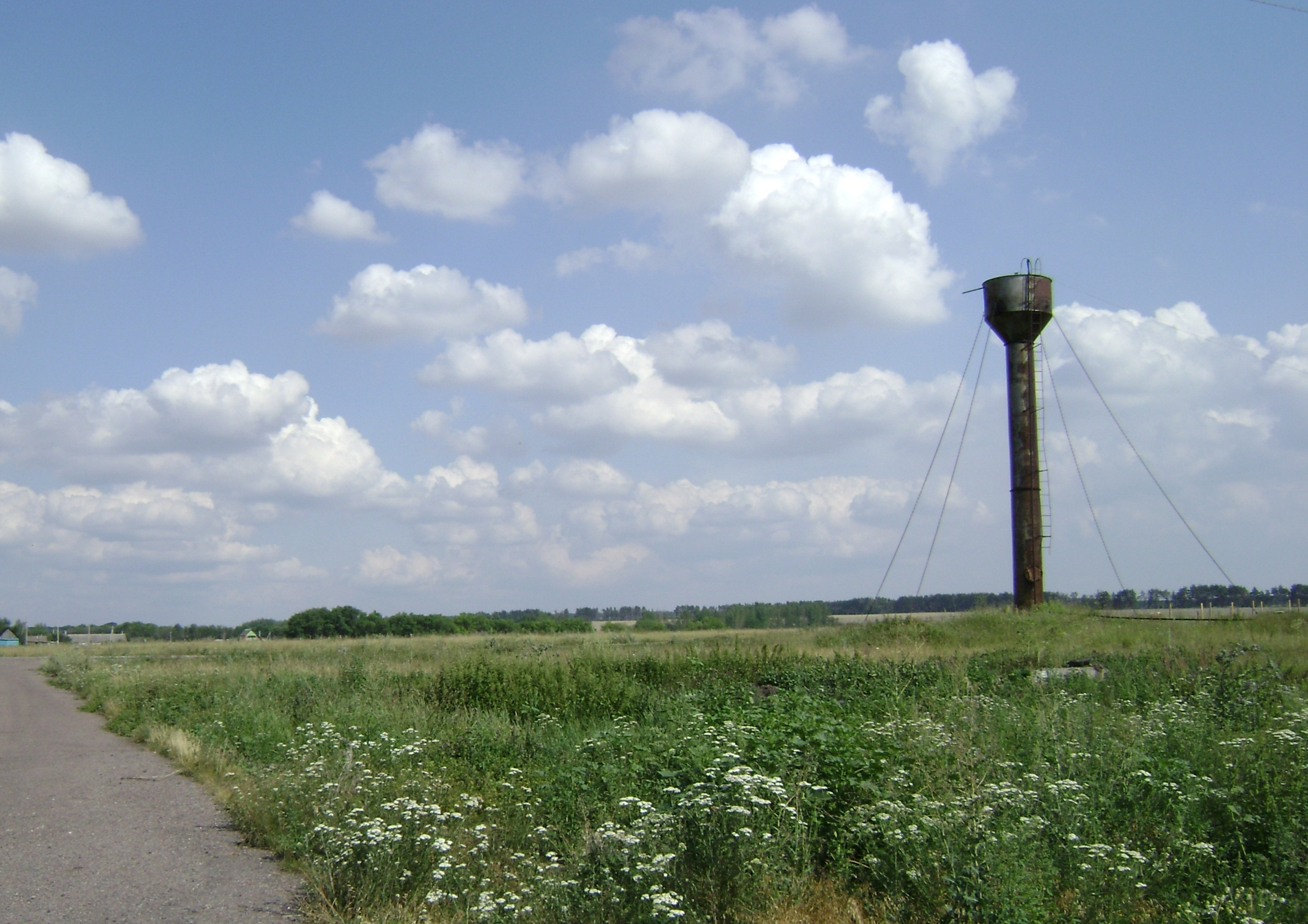 Водонапорная башня в Горожанке (Рамонский район, Воронежская обл.). На юге села